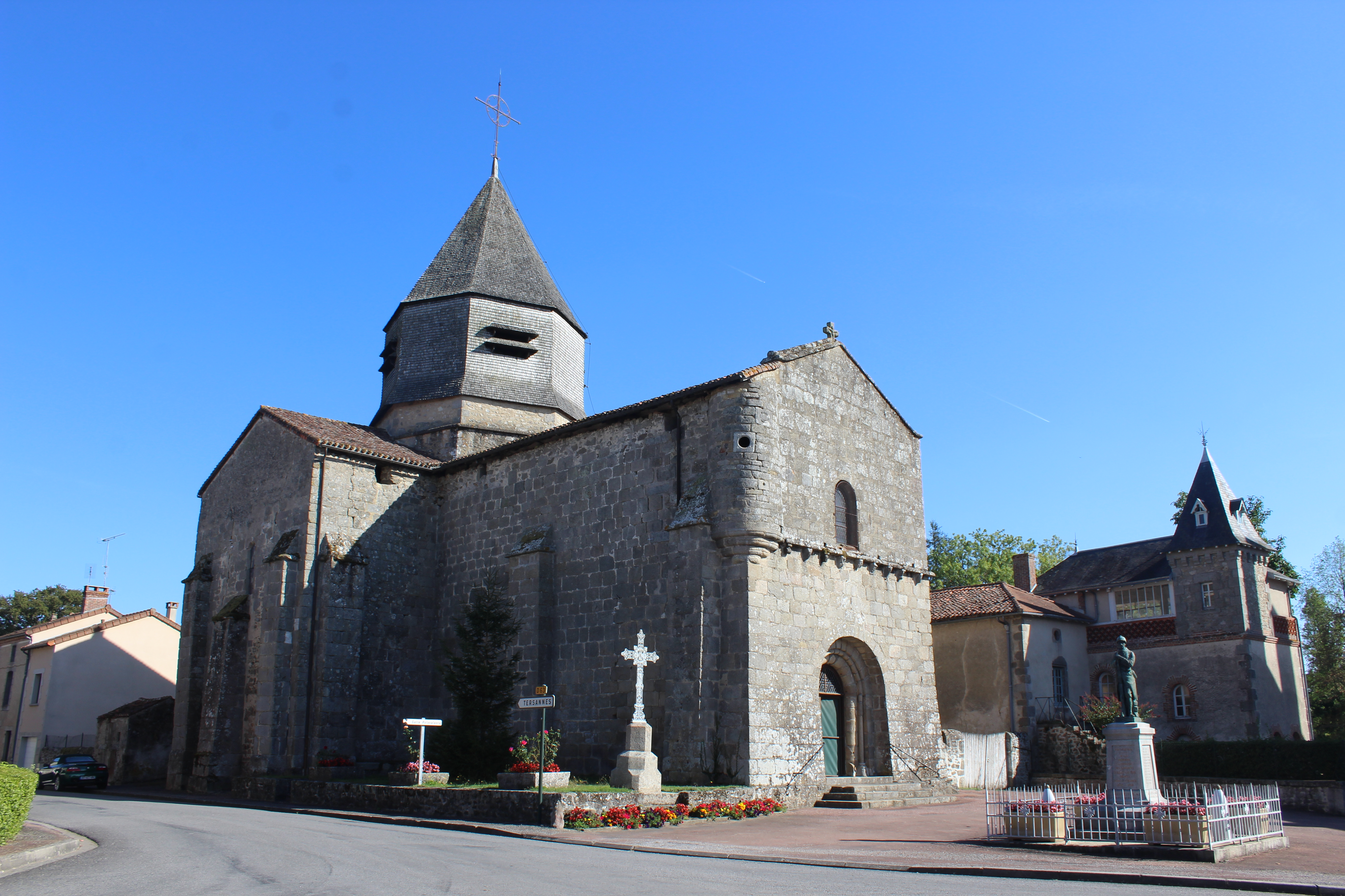 Vue extérieur de l'église Saint-Genest d'Azat-le-Ris (87) et Monument aux morts.